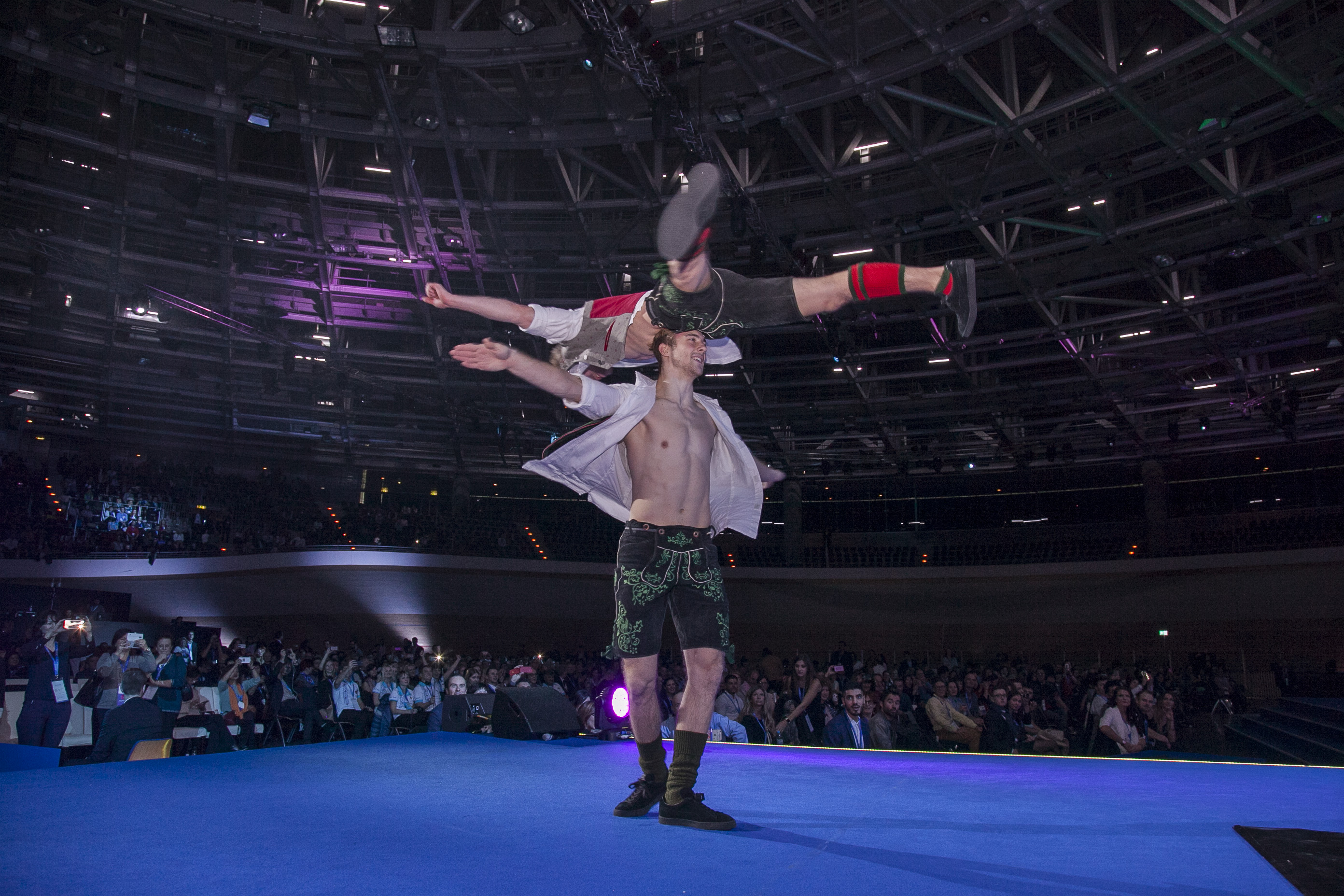 DDC mit Breakdance in Lederhosen